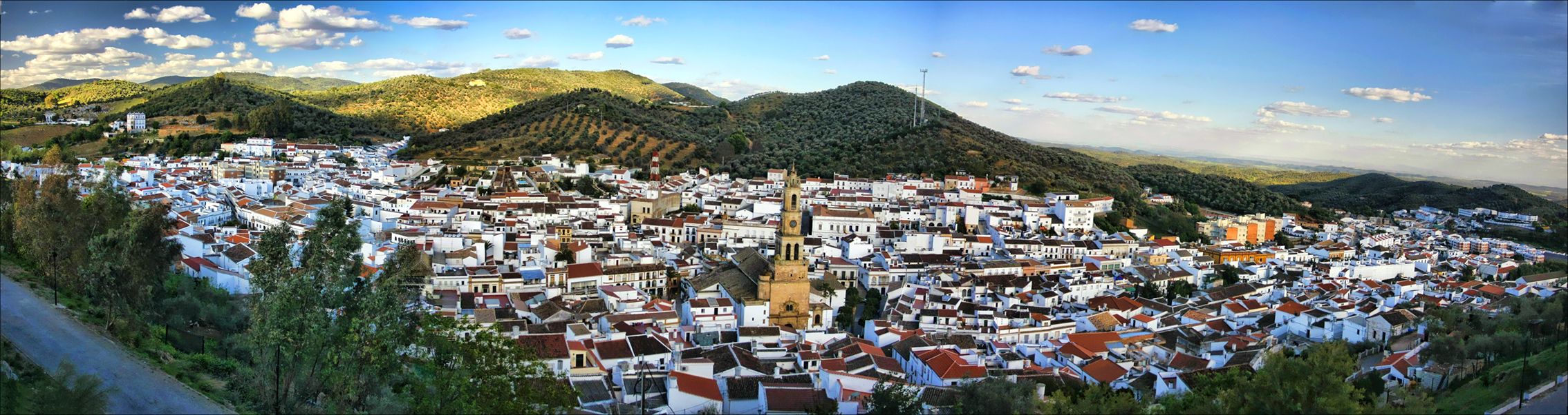 fotografia panoramica desde el castillo